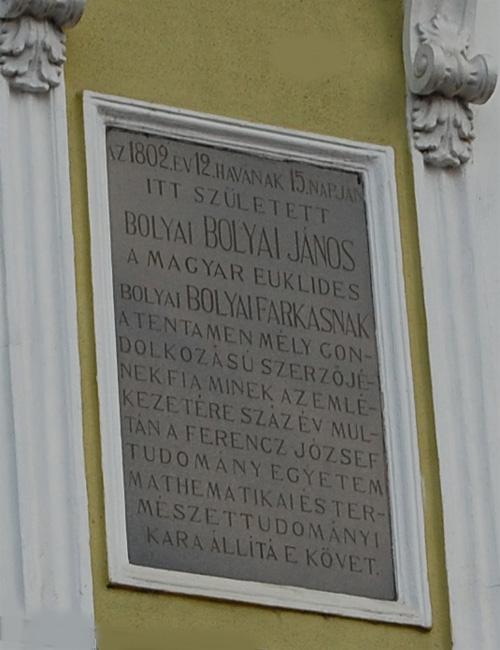 Emléktábla Bolyai János kolozsvári szülőházán, felavatva 1903-ban